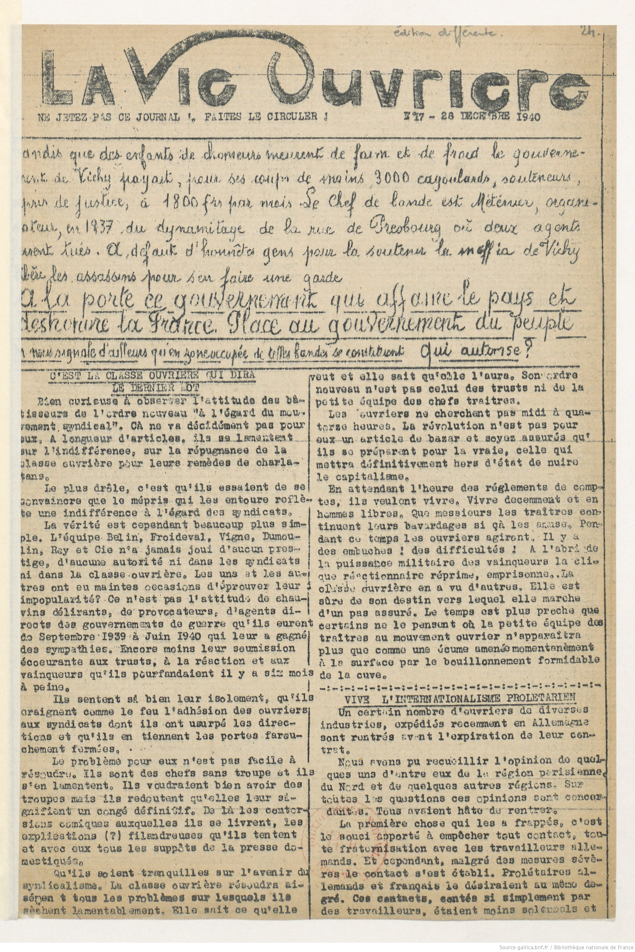 Une de La Vie ouvrière n° 17 du 28 décembre 1940